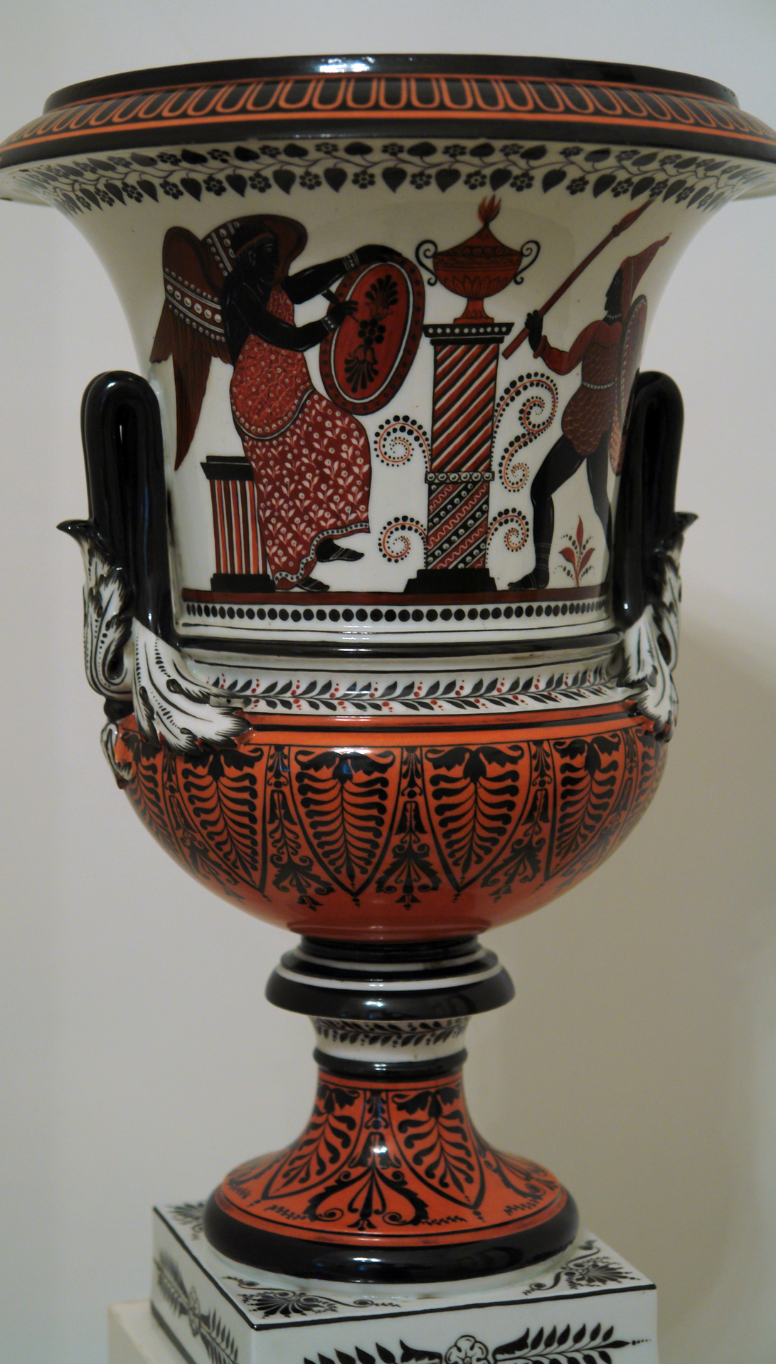 Ваза. 1830-ые. Императорский фарфоровый завод. Фарфор, роспись надглазурная. Ф-10406. Русский музей. Михайловский замок.